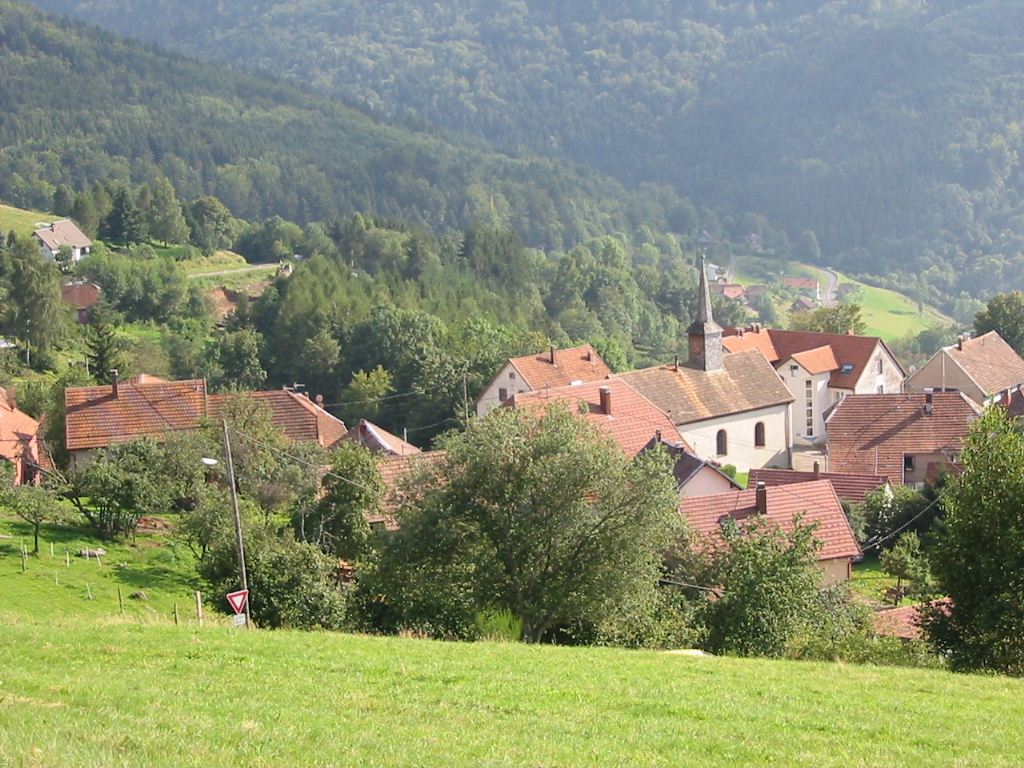 Belmont, commune du bas-Rhin